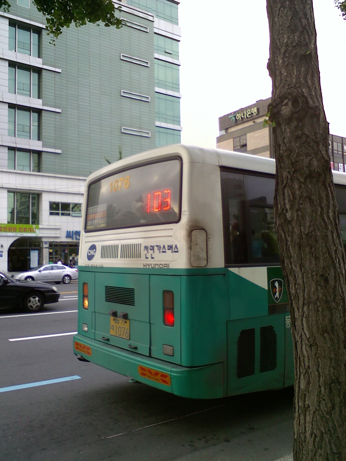 뒤쪽LED 번호판이 장착한 창원시내버스 103번, 자작